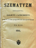 Strona tytułowa: "Szematyzm Królewstwa Galicji i Lodomerii". 1911.